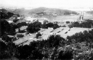 改制后的岳麓书院